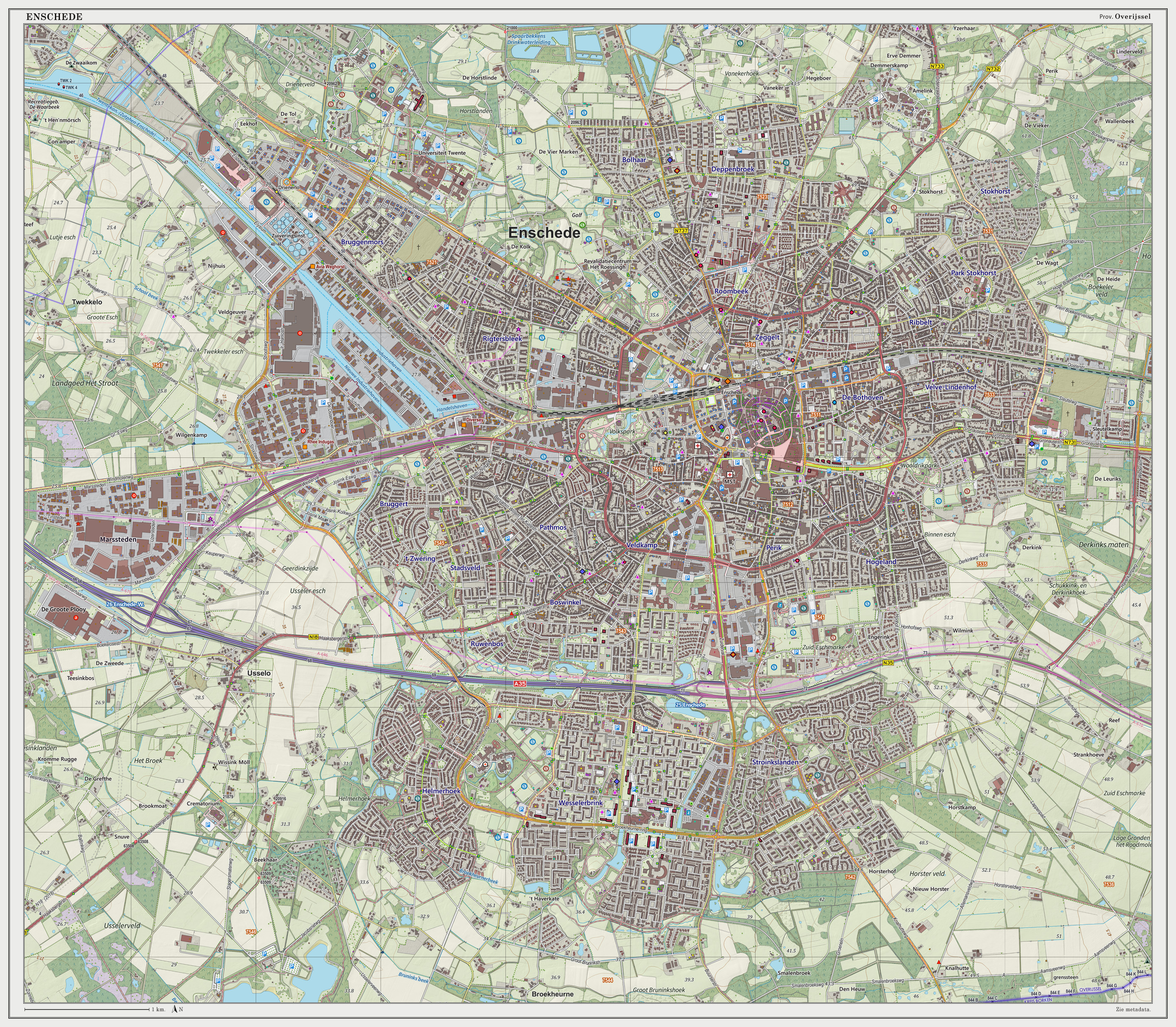 Topografische kaart van Enschede (woonplaats). Resolutie: 300 pixels/km. Kaartbeeld samengesteld uit de open geodata van de Top10NL en Top25namen (Basisregistratie Topografie, Kadaster), Creative Commons BY licentie. Gebouwvlakken uit open geodata BAG extract. Wegen uit de OpenStreetMap. Schaduwreliëf uit de Actuele Hoogtekaart AHN2. Samenstelling en kleurenschema: Jan-Willem van Aalst, met QGIS2. Zie ook de Legenda.